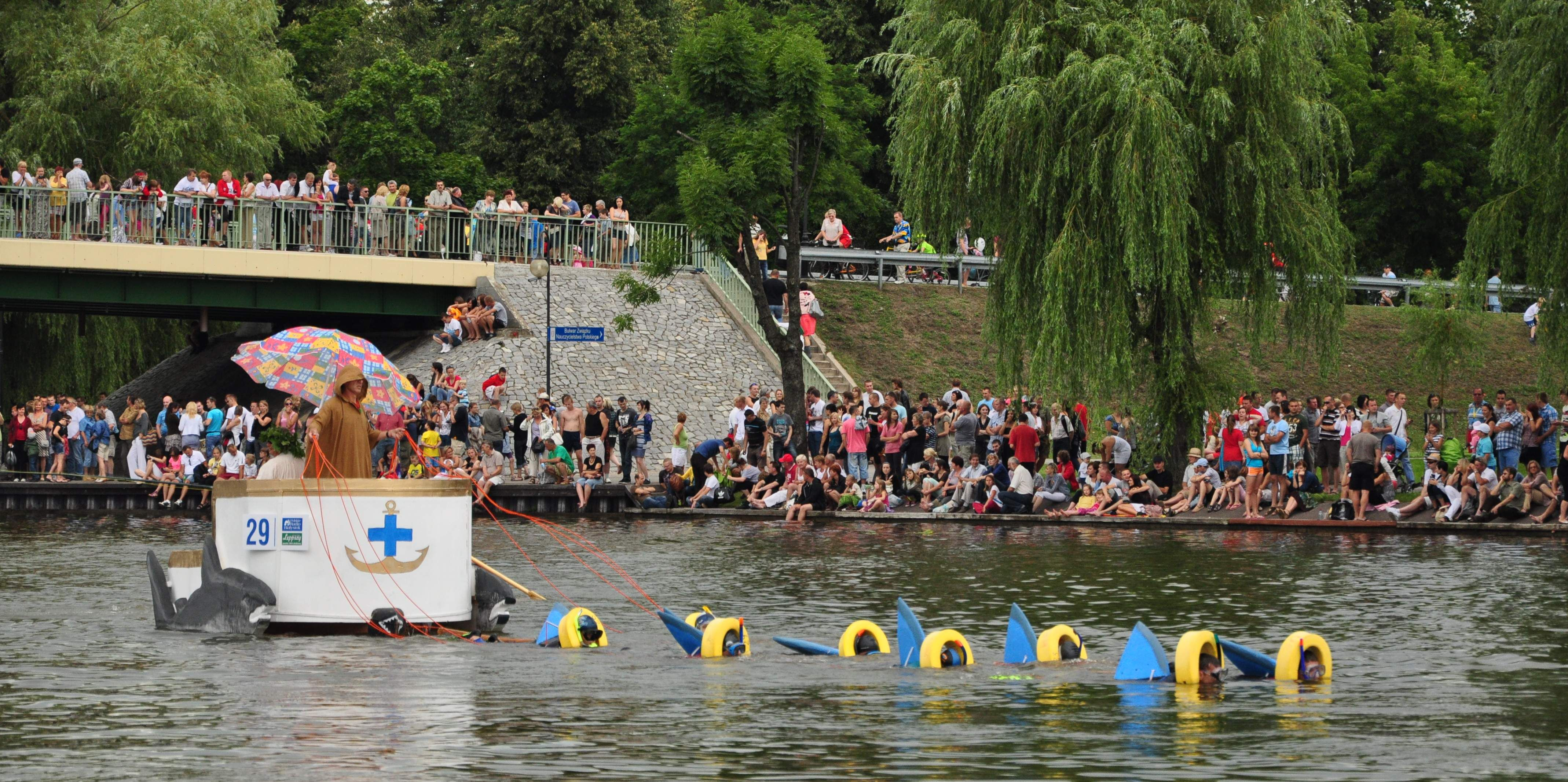 Andrzej Ostrowski na Mistrzostwach Polski w pływaniu na byle czym 2011